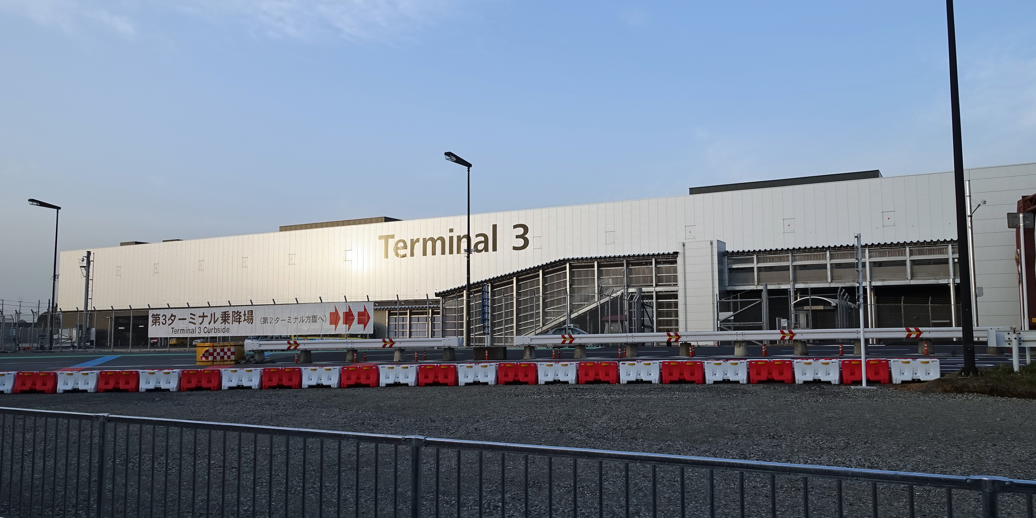 成田国際空港第3ターミナル全景（外観）